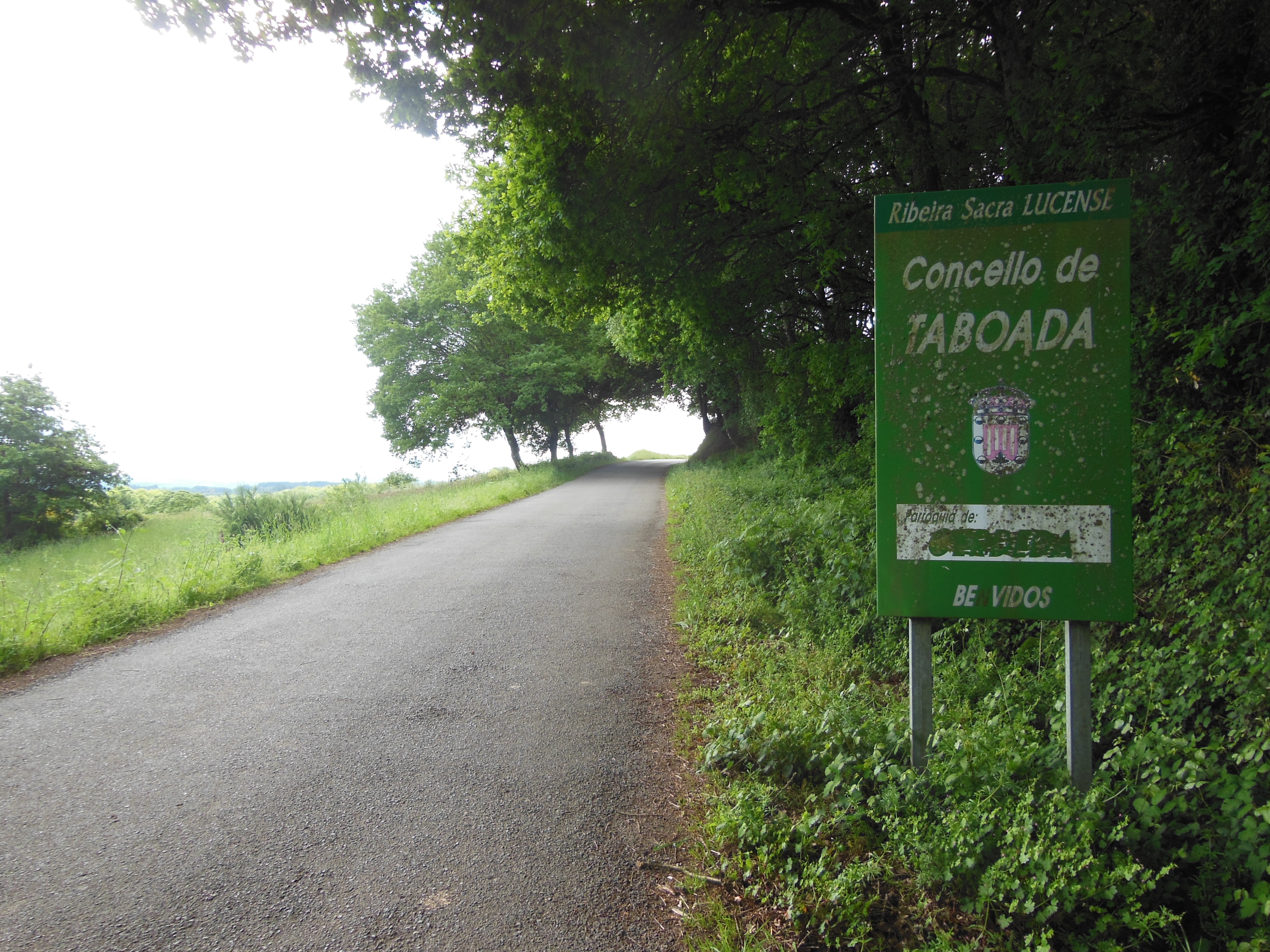 Sinal de entrada no concello de Taboada desde Antas de Ulla, na estrada LU-P-1809